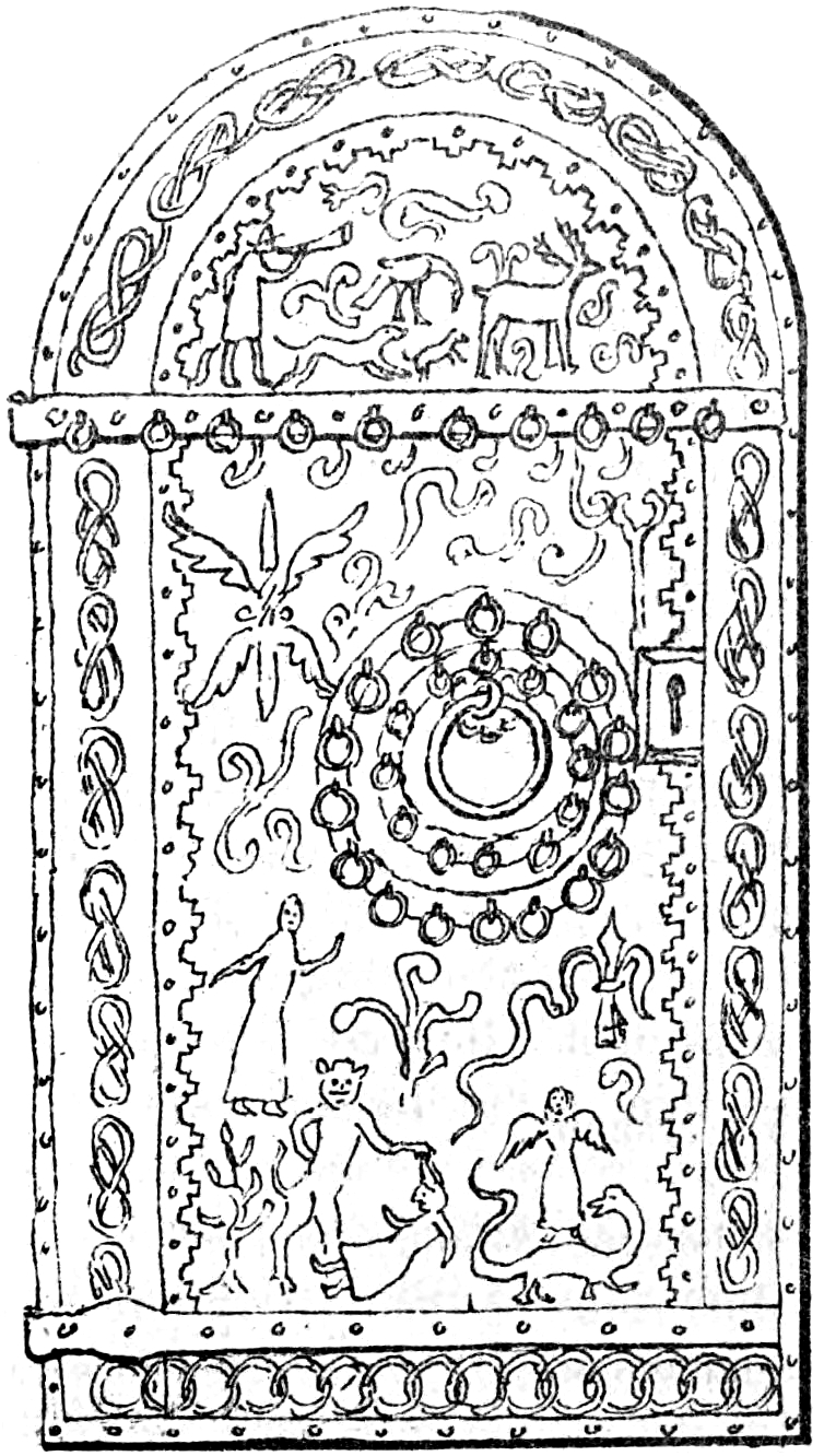 Porten till Rogslösa kyrka i Östergötland. Dörren kommer enligt folksägnen från "drottning Åmmas borg i Omberg". Teckning i "Utdrag af Antiqvitets-Intendenten P. A. Säves afgifna berättelse för år 1861", publicerad i Antiqvarisk tidskrift för Sverige band 1, 1864.